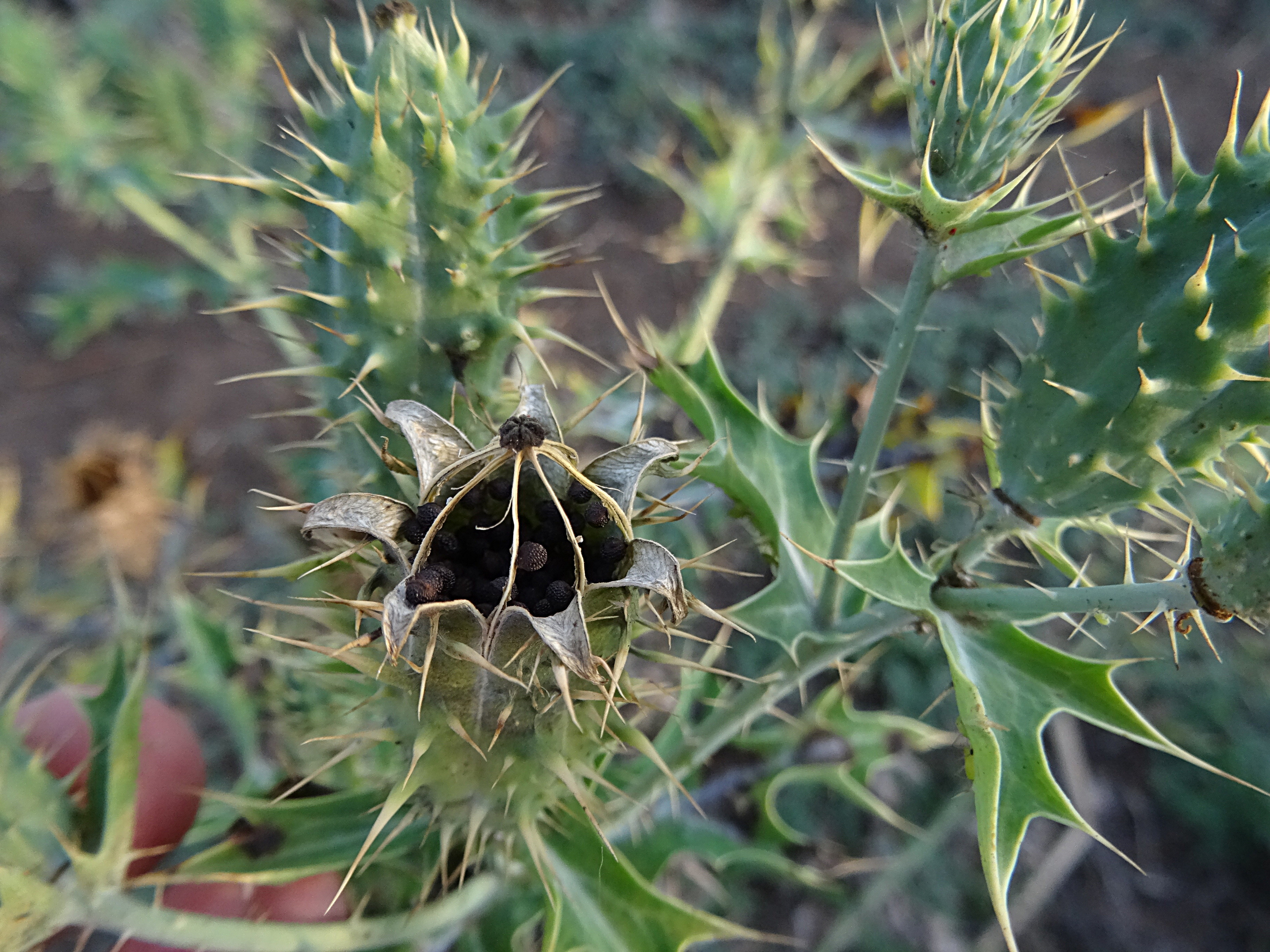 Mexikanischer Stachelmohn, Argemone mexicana, gelber Distelmohn, Kapsel mit Samen